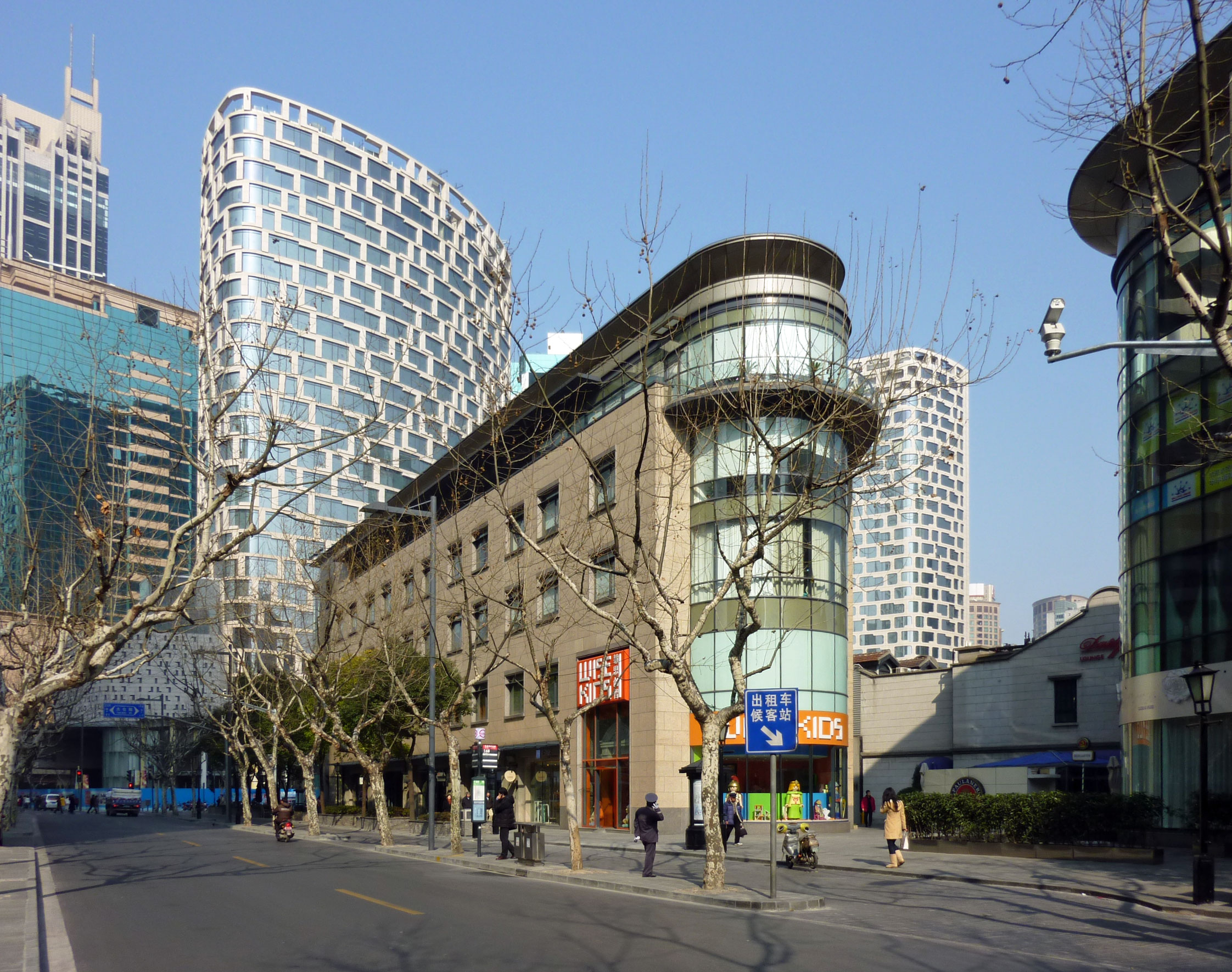 Xintiandi 新天地(上海)